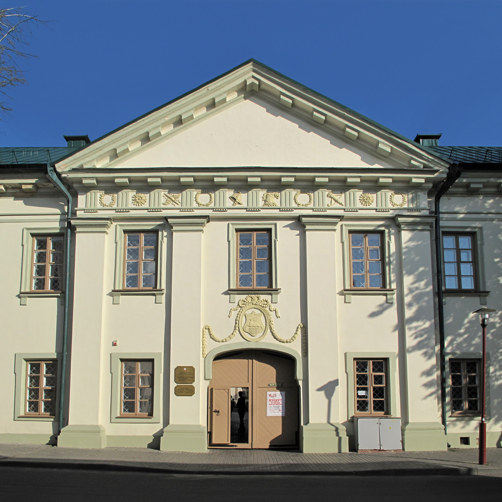 Беларуская (тарашкевіца): 222222